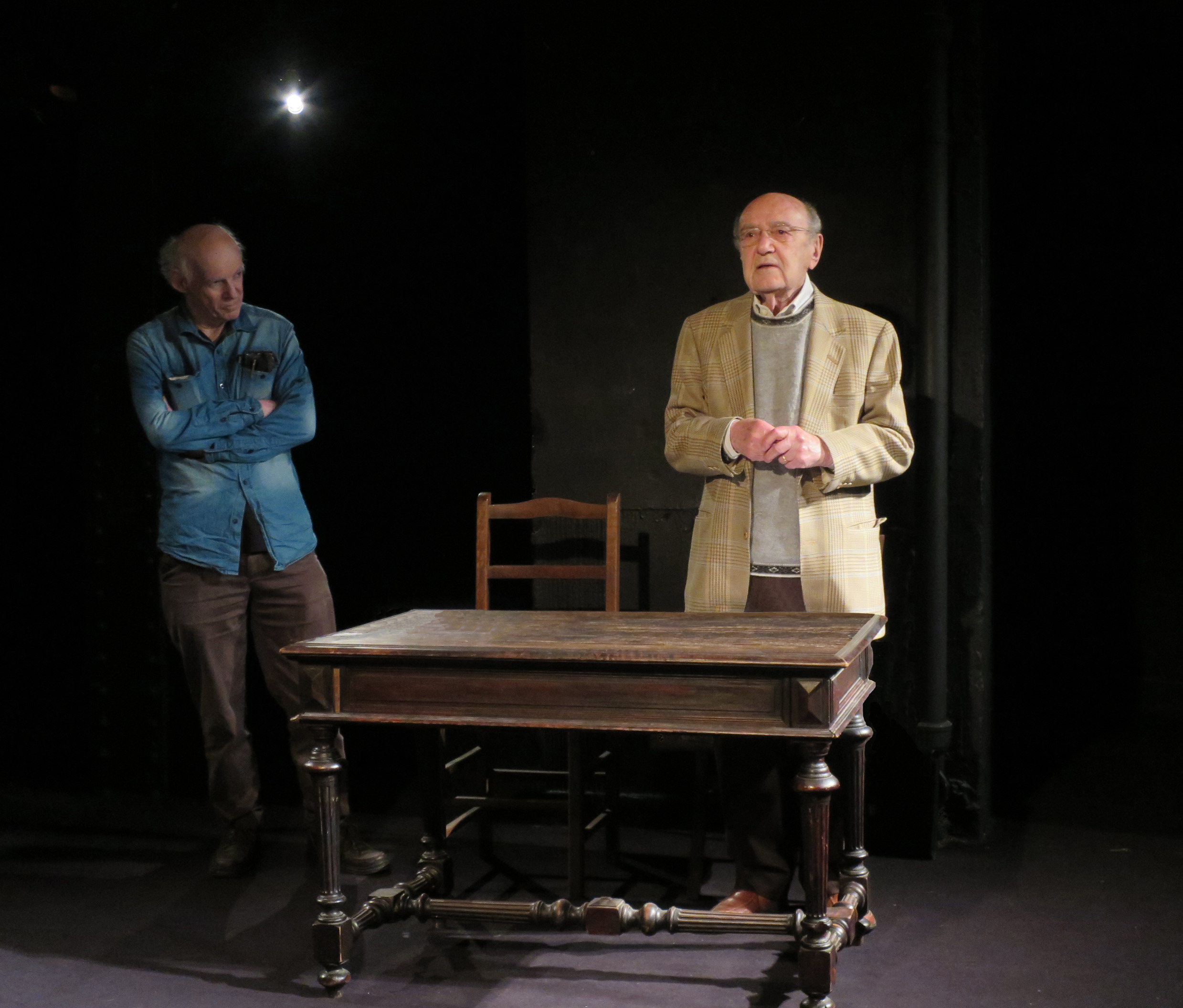 photo de Robert Marcy en scène dans "Tout Shakespeare en une soirée" de Thomas Bernhard. Avec Jean-Luc Jeener au second plan.